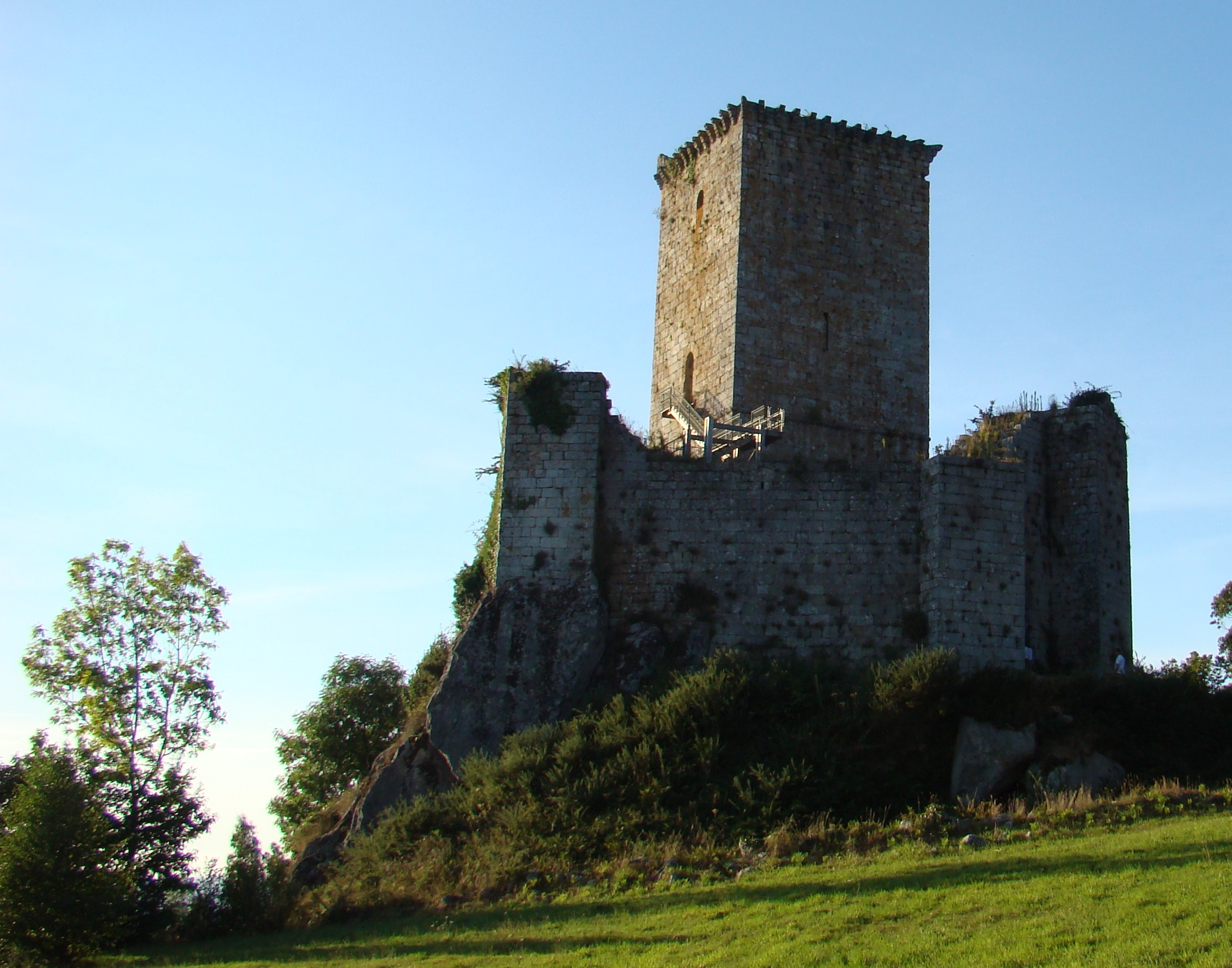 Castelo de Andrade, Pontedeume, Galiza